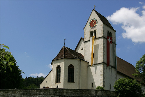 Kirche Sankt Nikolaus in Dittingen